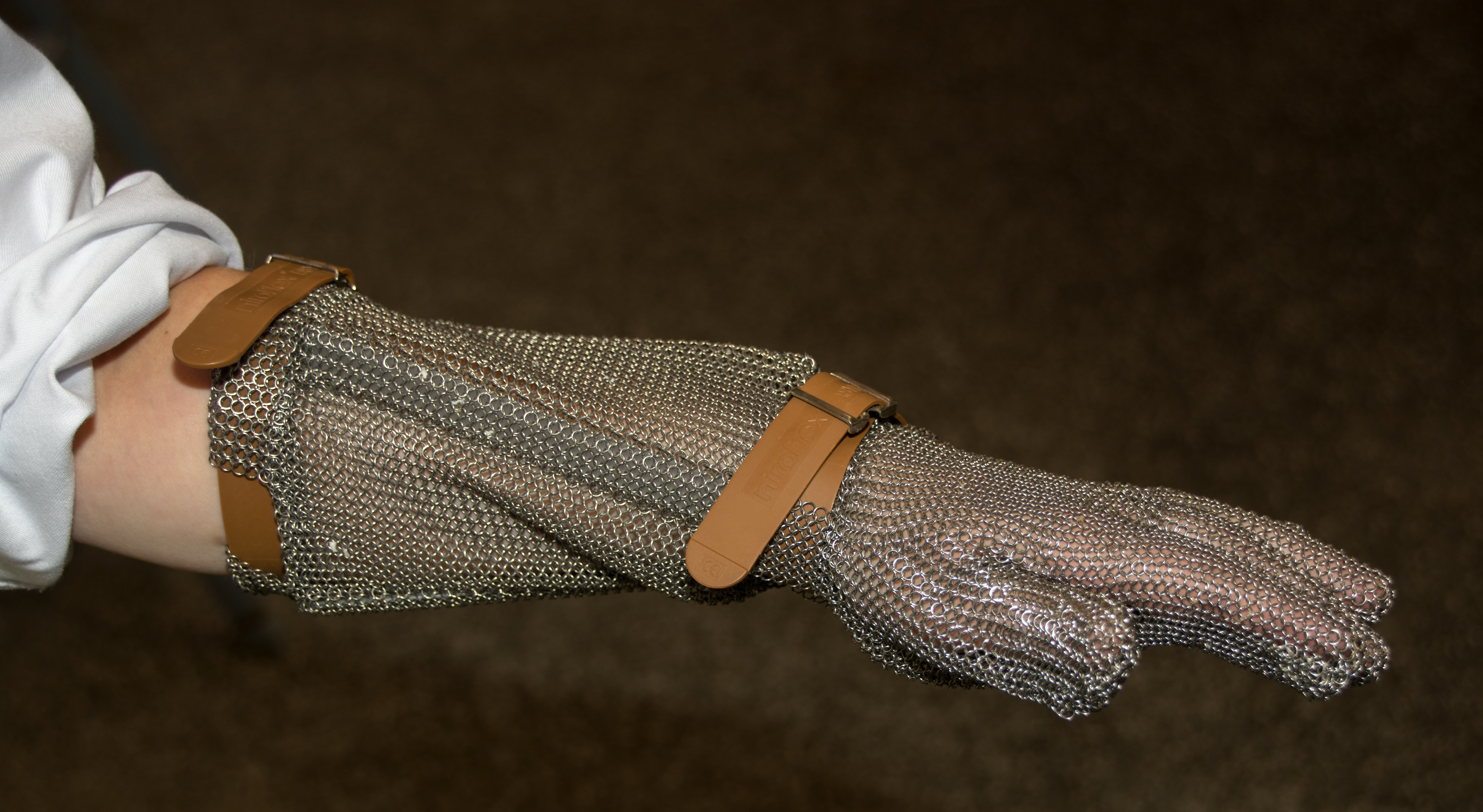 Wiki Loves Mett: Stechschutzhandschuh für Fleischer mit Unterarmschutz